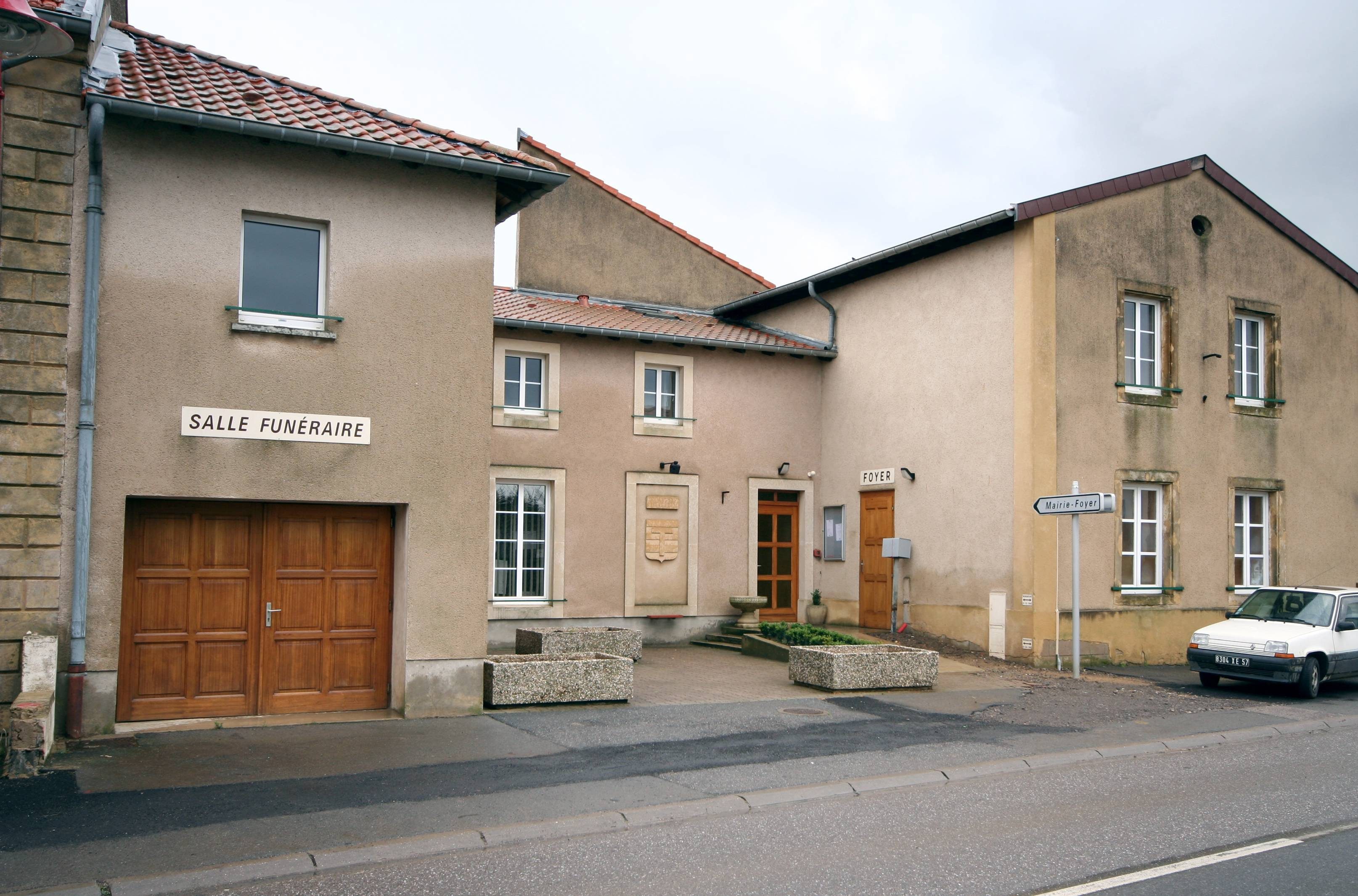 Gavisse Gemeng.